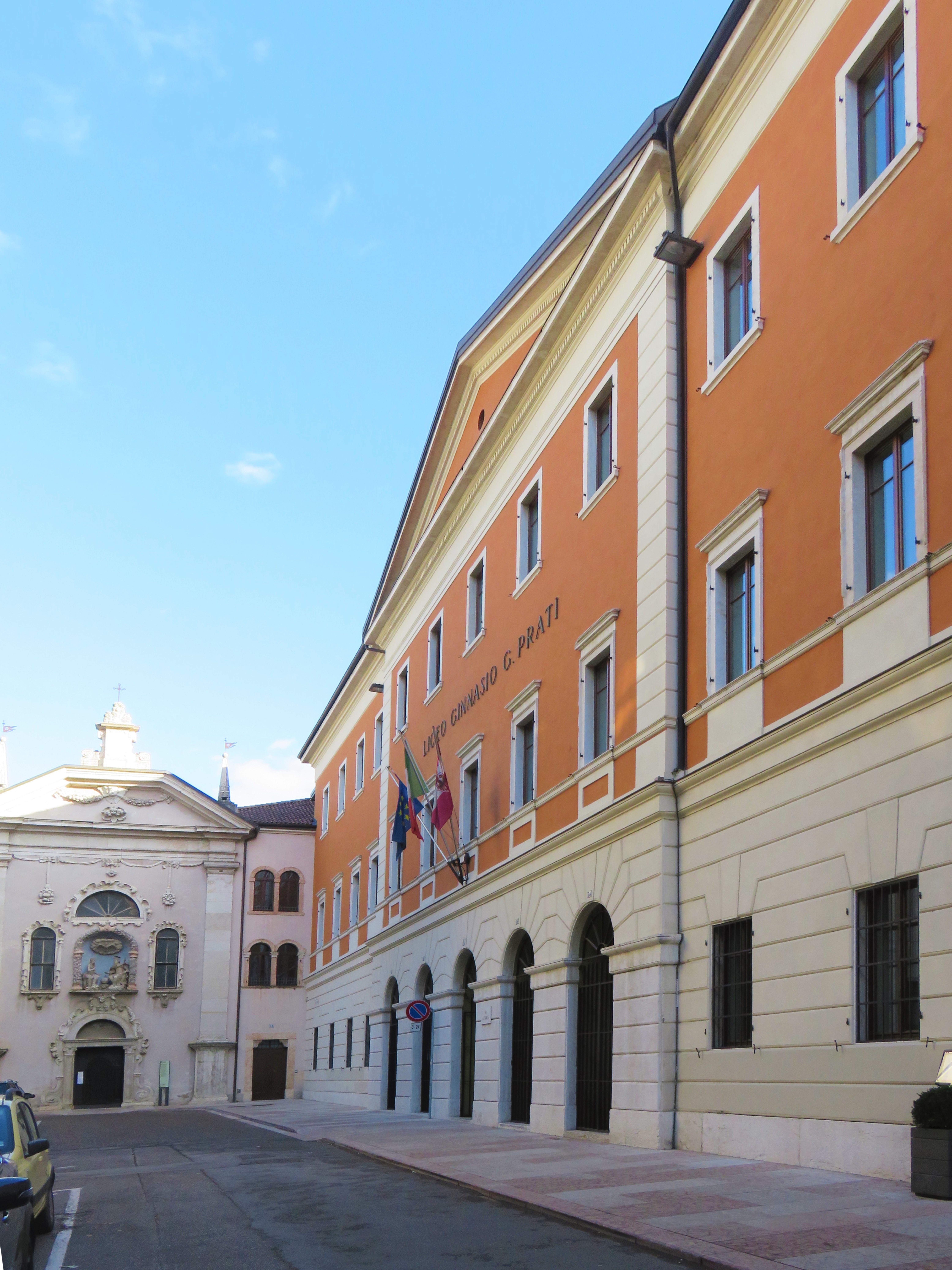 Facciata del liceo vista da via SS. Trinità. In fondo chiesa della SS. Trinità.